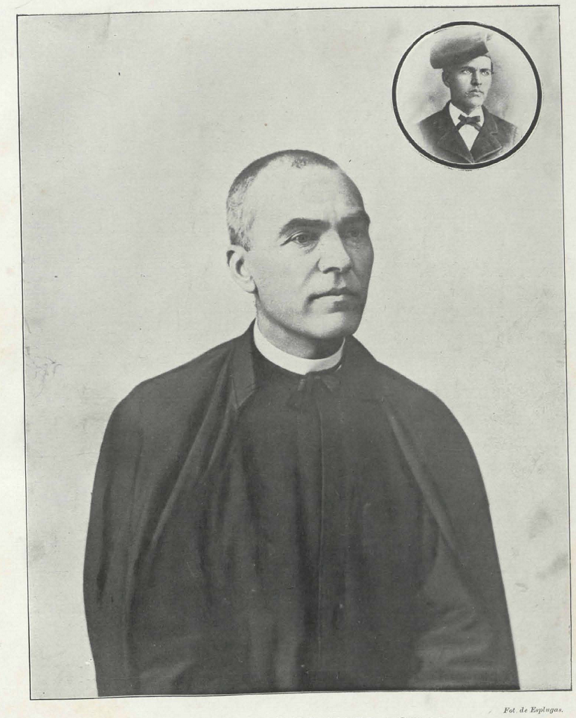 Retrato de Jacinto Verdaguer, obra del fotógrafo Antoni Esplugas i Puig, en la revista Álbum Salón.